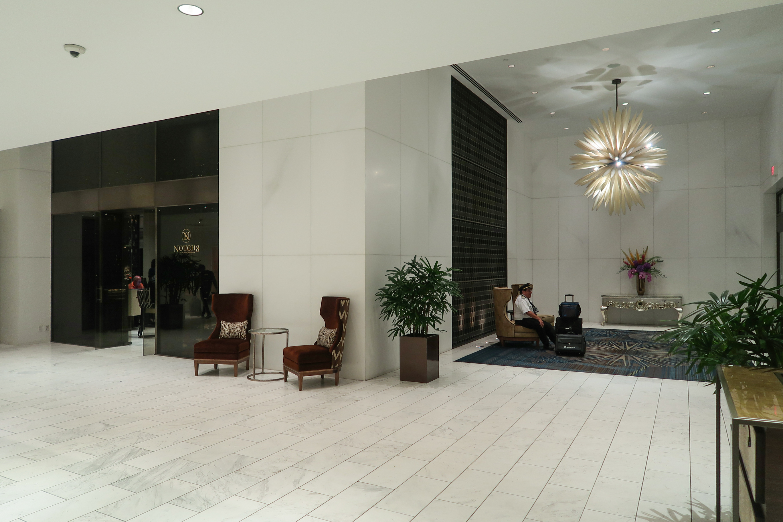 Fairmont Hotel Vancouver Lobby